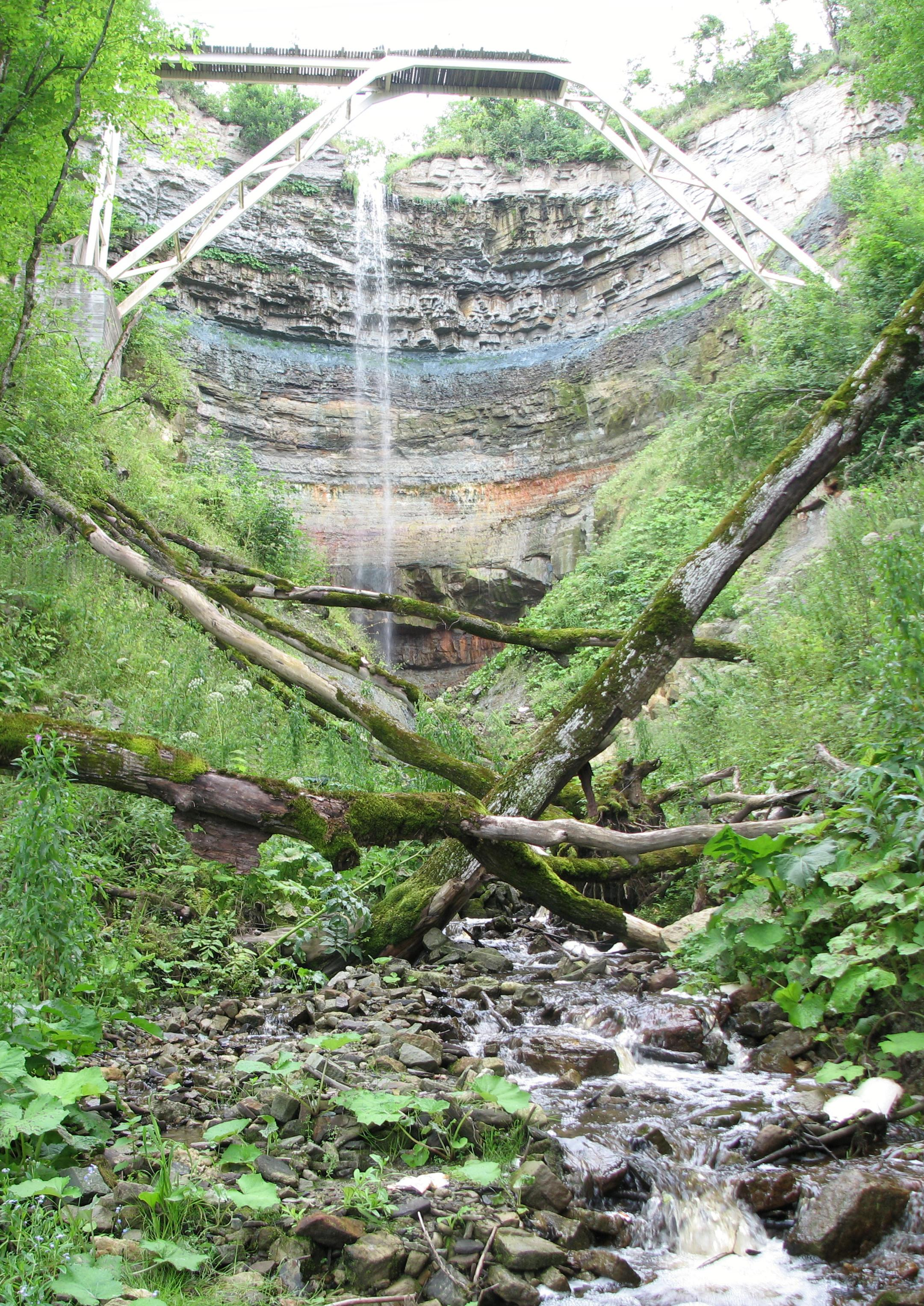 Valaste falls, Ontika, Estonia. Summer 2008